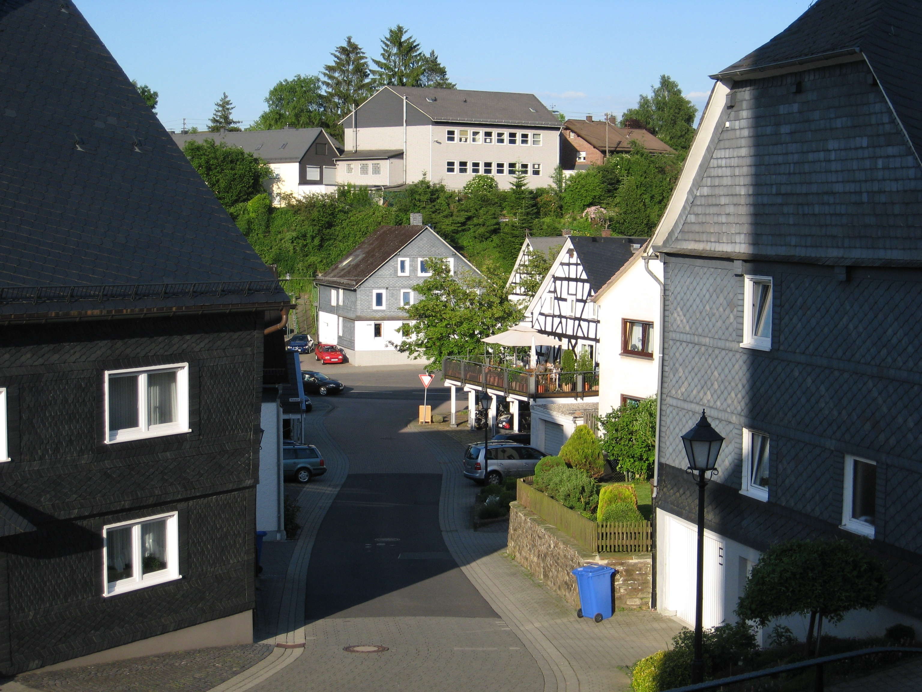 Wilnsdorf: Blick von der evangelischen Kirche in Richtung der alten Ortsmitte.